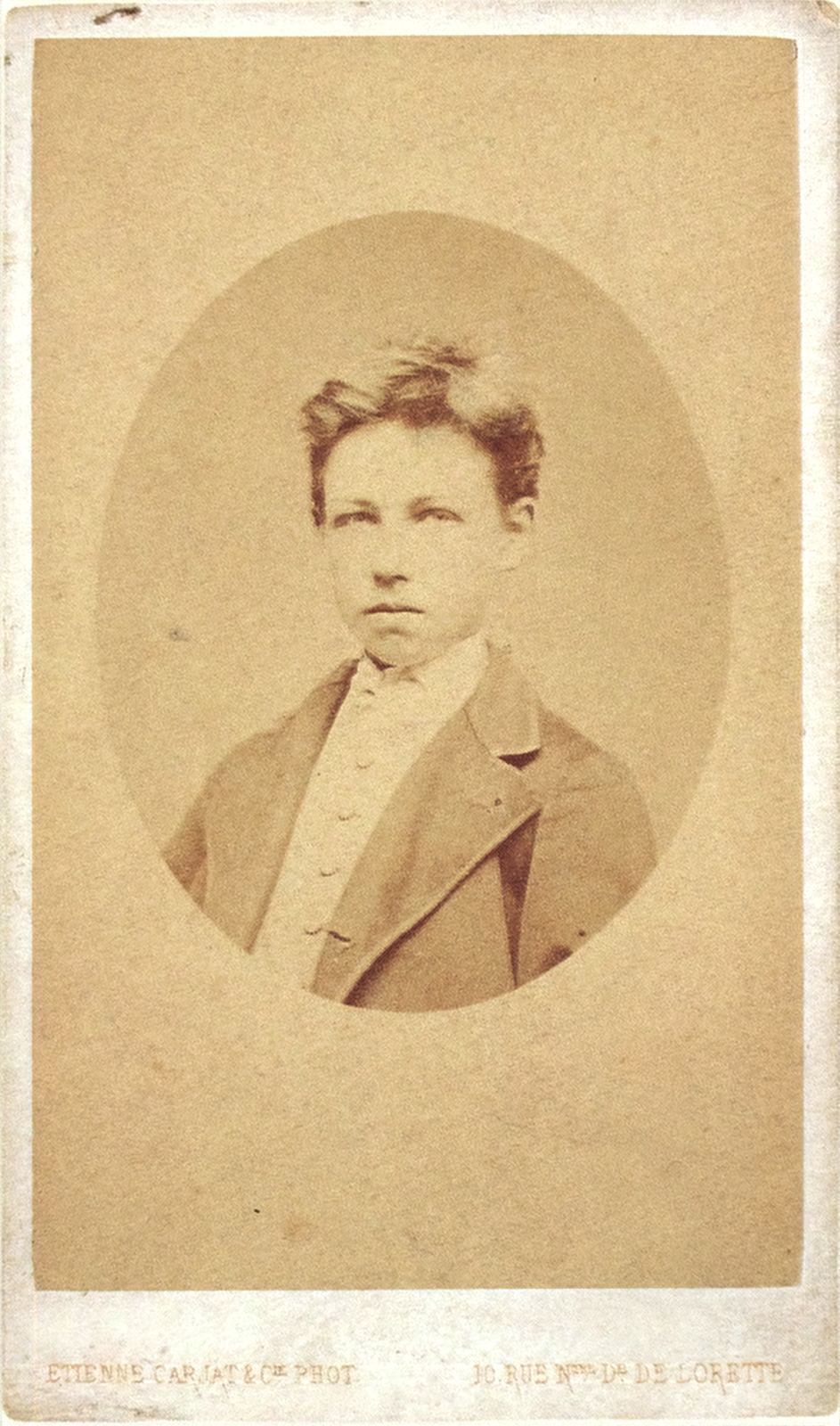 Arthur Rimbaud vers 1870/71. Photo-carte de visite retirage d’Étienne Carjat d'après un cliché peut-être pris à Charleville. Collection Jacques Guérin, vente Tajan (191 000 francs) novembre 1998, puis à nouveau chez Pierre Bergé, janvier 2003 (81.379 €). (D'autres tirages existent.)